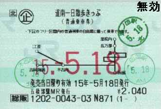 道南一日散歩きっぷ 使用済券